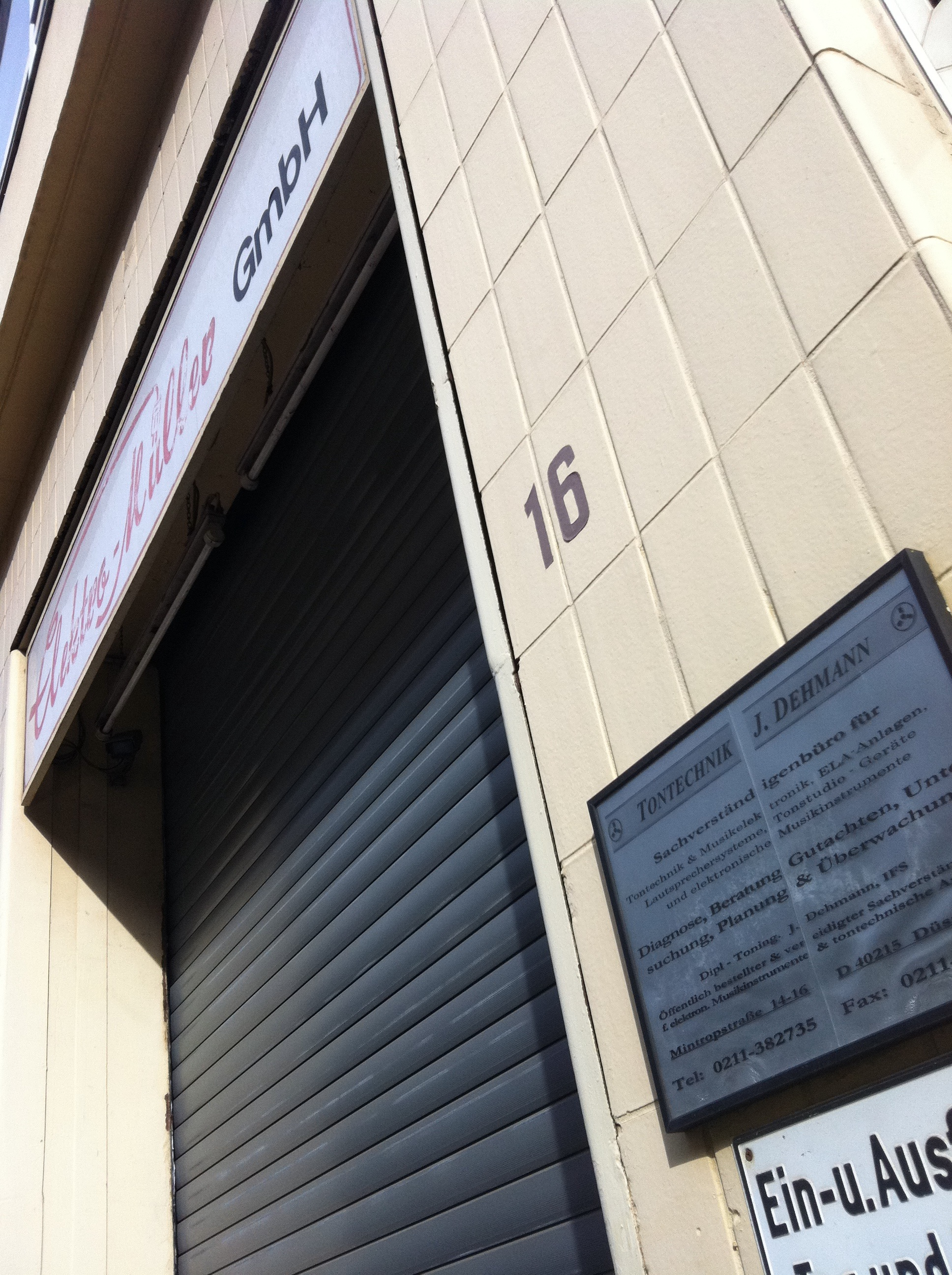 Kraftwerk Proberaum